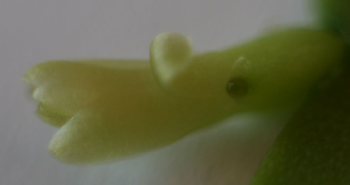 Pseudorhipsalis ramulosa (Hylocereeae; Cactaceae; Planta) kaktusz virága